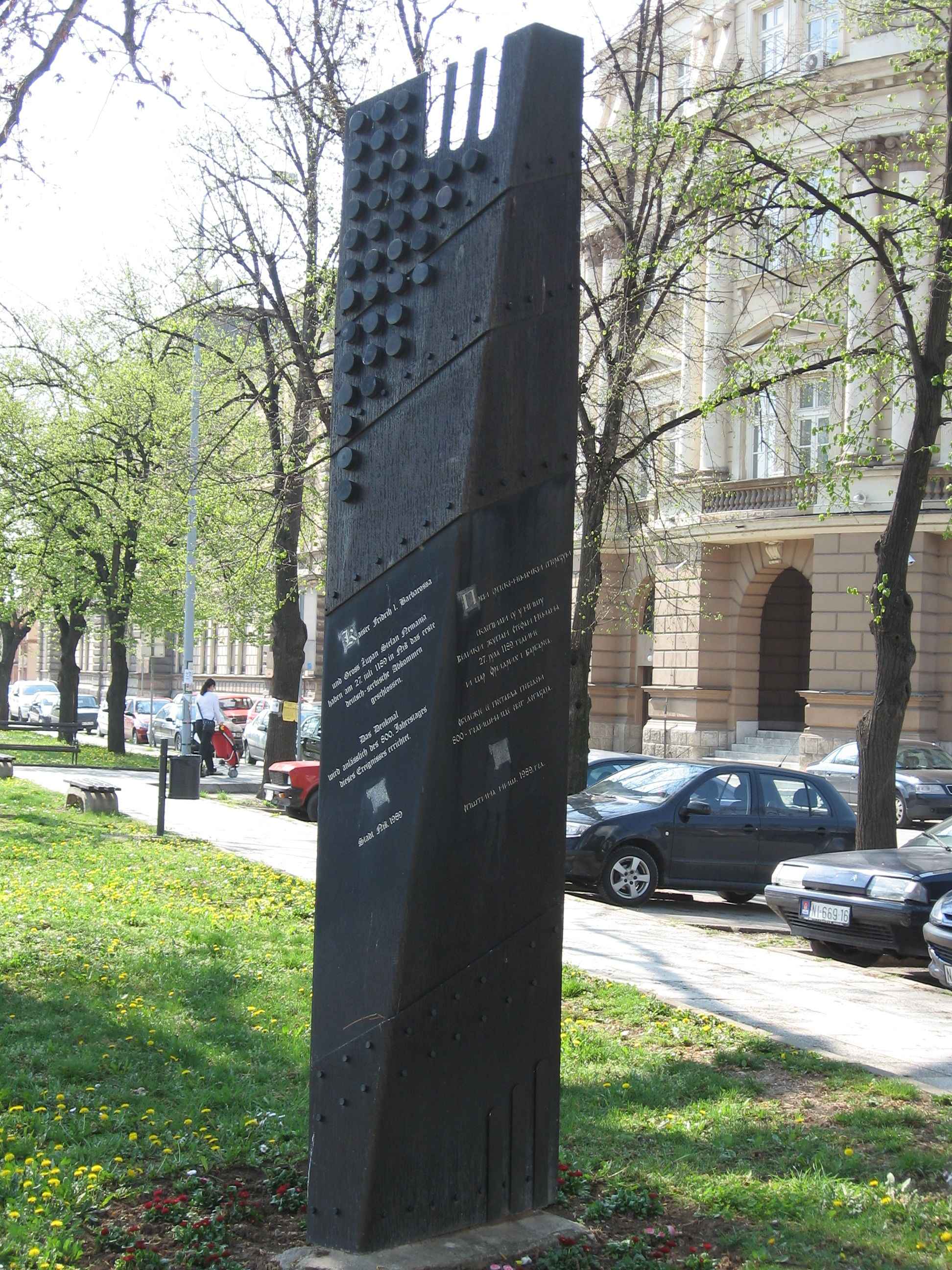 Споменик Барбароси у Нишу. Снимљено у априлу 2010.